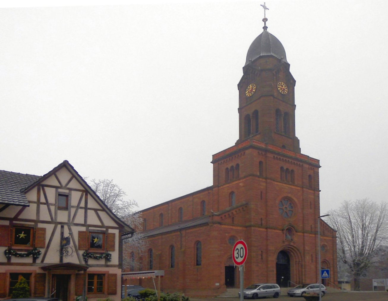 Kirche St. Leopold in Mahlberg, Ortenaukreis